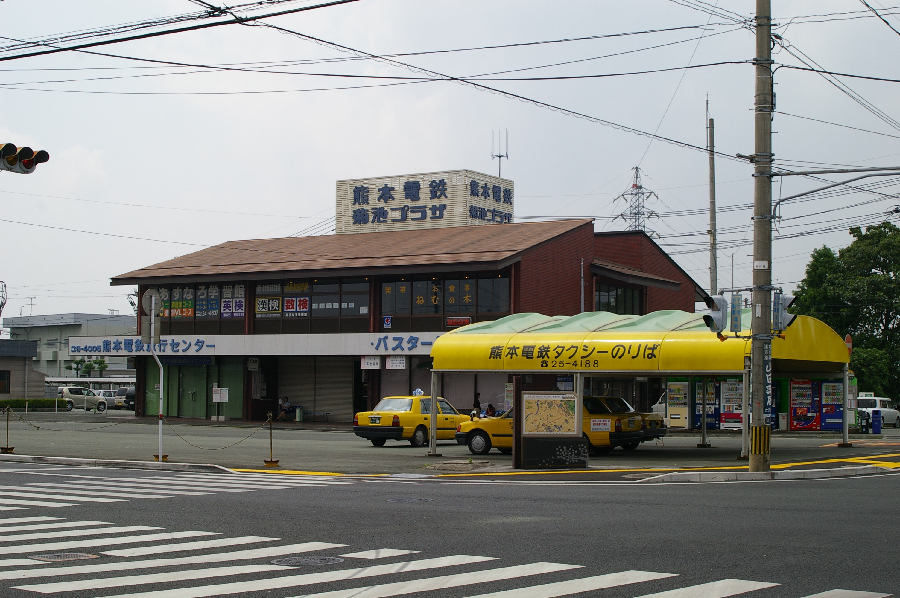 Kikuchi Plaza at Kikuchi city, Kumamoto Pref., Japan